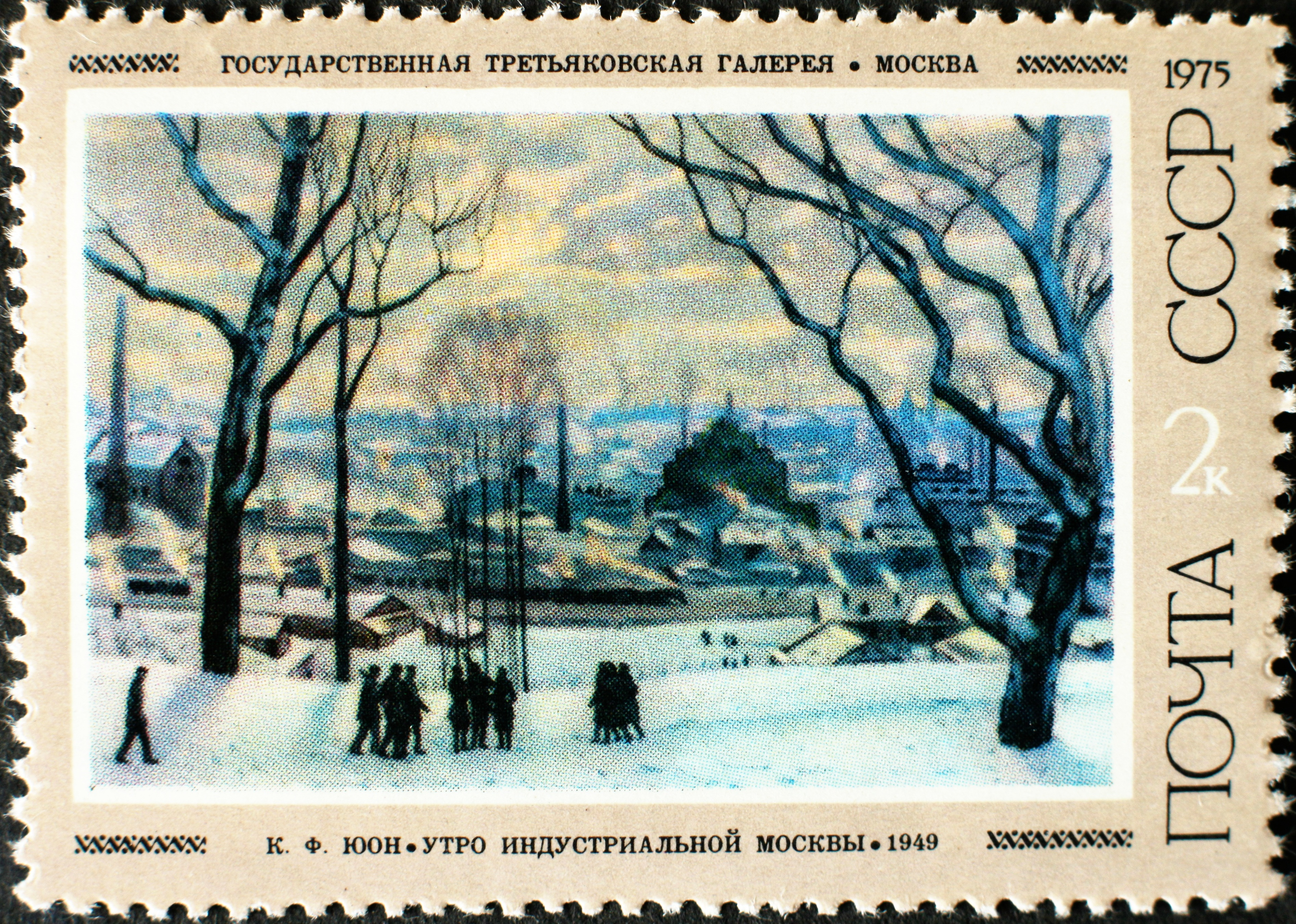 Briefmarke, Sowjetunion